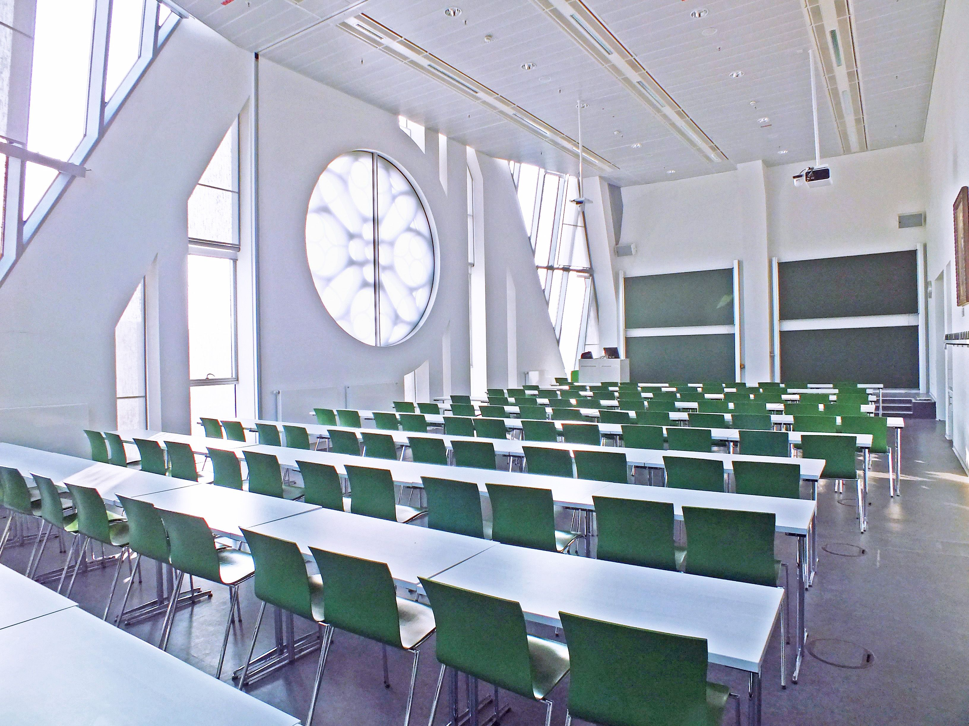 Der Hörsaal „Felix Klein“ des Mathematischen Instituts der Universität Leipzig im „Paulinum - Aula und Universitätskirche St. Pauli Leipzig“, hinter der zum Augustusplatz gerichteten gotischen Rosette